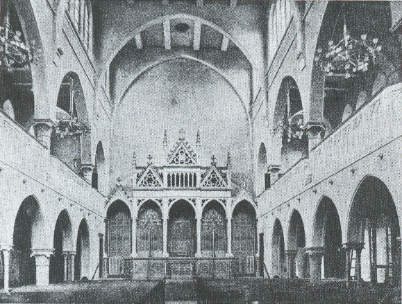 Synagoge Neudeggergasse in Wien-Josefstadt Innen noch ohne Bemalung kurz nach der Fertigstellung